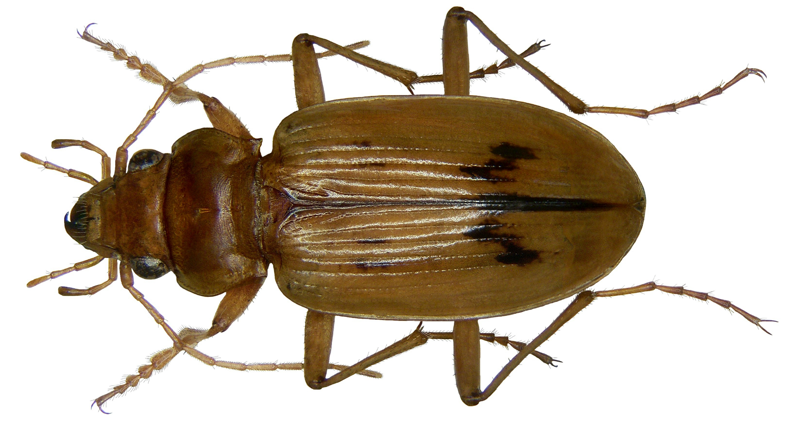 Familie: Carabidae Größe: 17 mm Verbreitung: West-Europa Ökologie: an der Meeresküste Fundort: France leg.det. O.Schmitt Foto: U.Schmidt, 2008